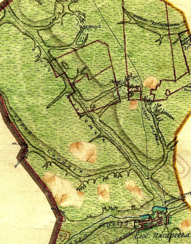 Писаревка и овраг Подорожный. Фрагмент плана Генерального Межевания уездов и губерний Российской Империи. Масштаб: 2 версты в дюйме (1 см-840м, 1:84000).